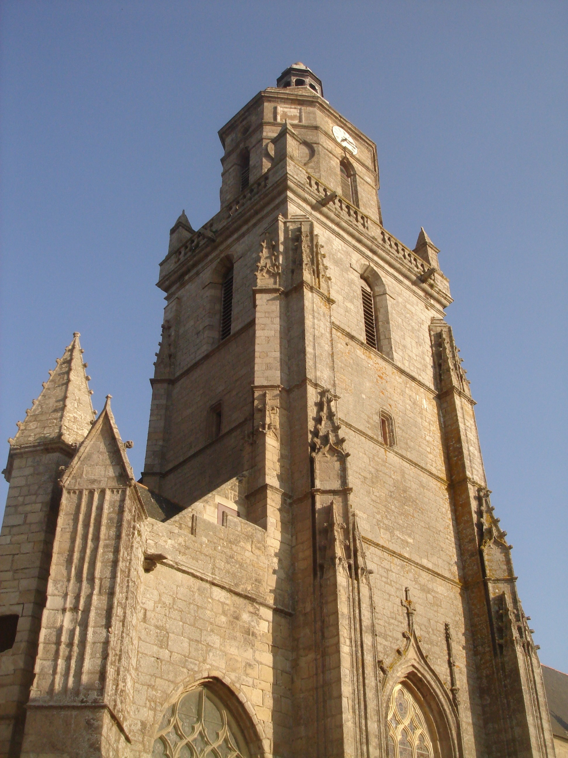 Église Notre-Dame-de-Pitié du Croisic, Le Croisic, Loire-Atlantique, Pays de la Loire, France